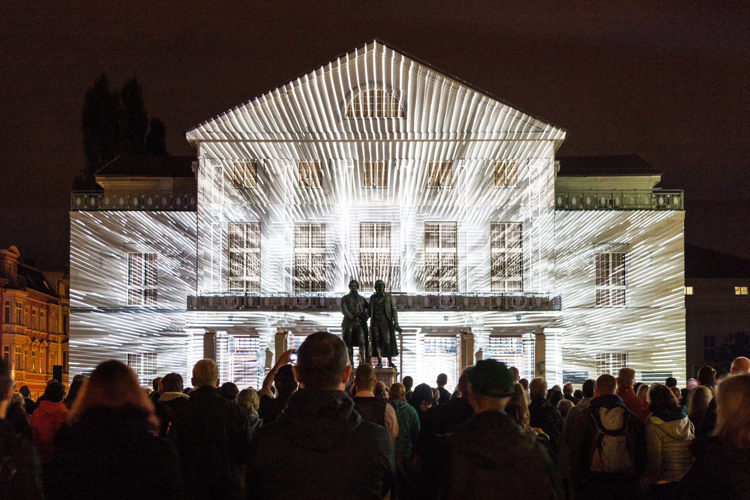 Videomapping "Klang3" von Ruestungsschmie.de, 2014 am DNT Weimar. Foto: Henry Sowinski